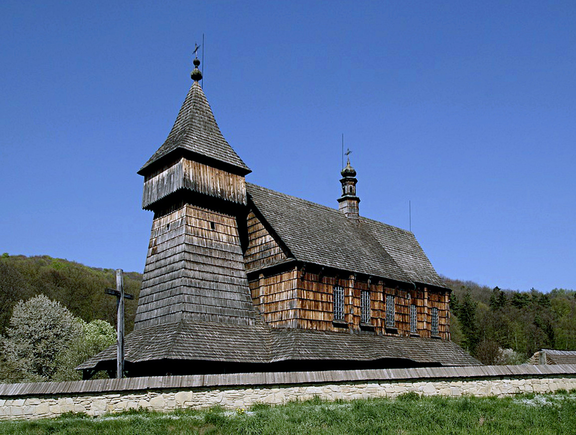 Kościół św. Mikołaja z Bączala Dolnego wzniesiony najpóźniej w 1667 roku, obecnie w zbiorach MBL w Sanoku